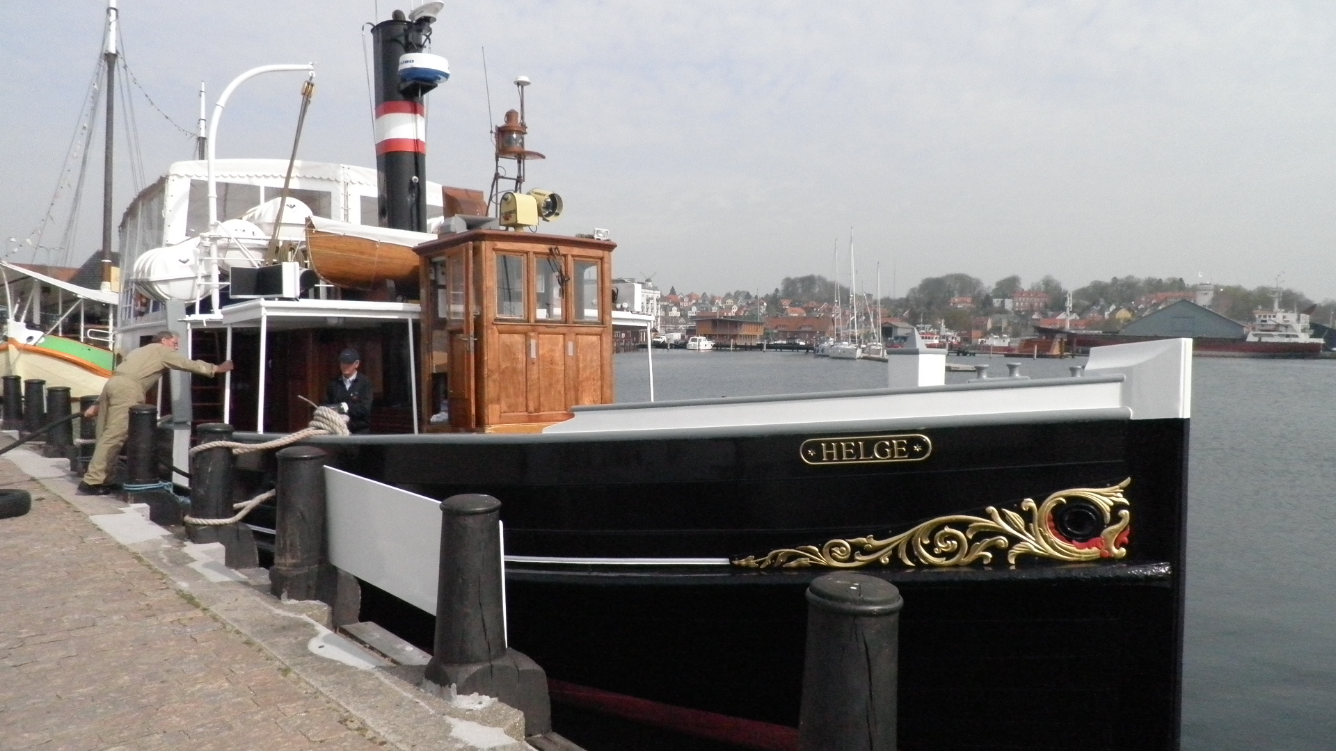 M/S Helge ved kaj i Svendborg Havn. Sejler fast i Sydfynske Øhav.